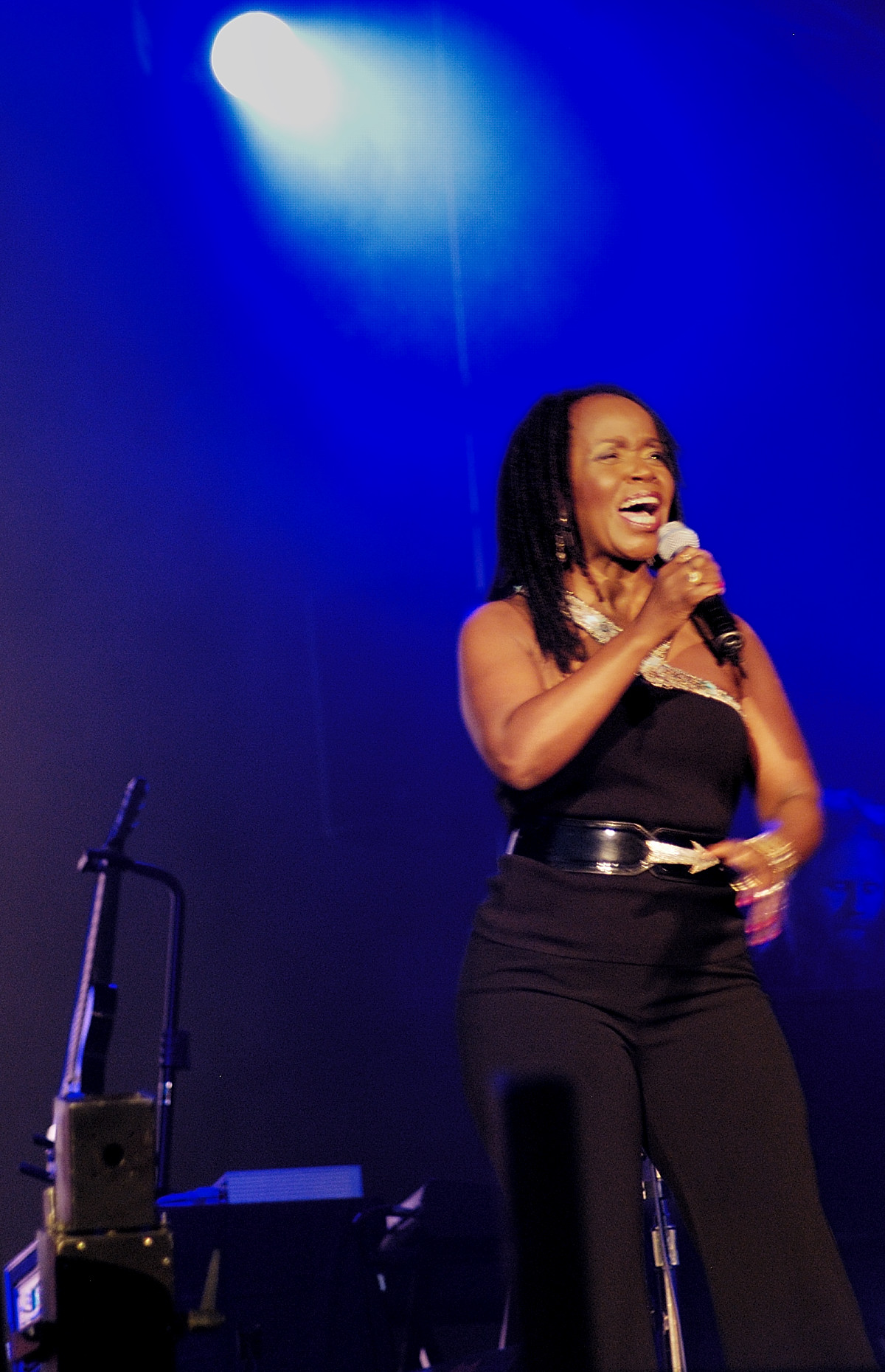 Vocalist P. P. Arnold, Roskilde Festival